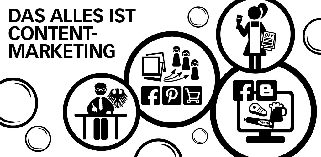 Beispiele für Content Marketing